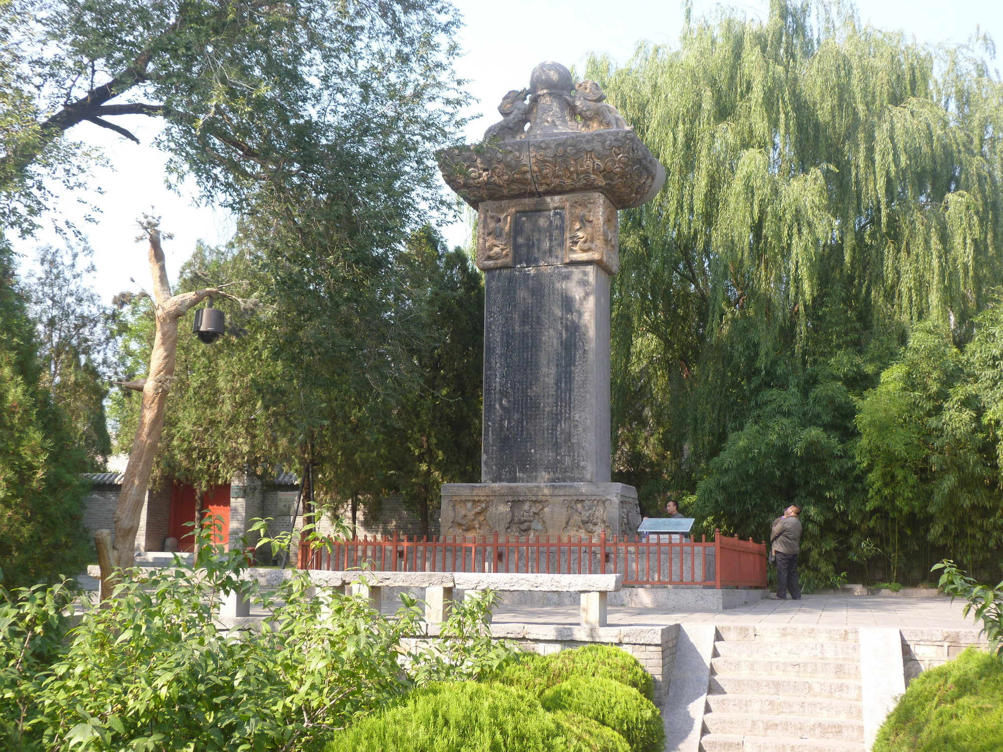 大唐嵩阳观纪圣德感应之颂碑